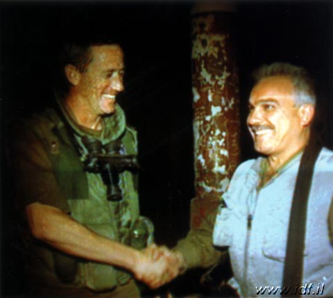 העברת השליטה במוצב טייבה של צה"ל לידי צד"ל במסגרת שינויים בהיערכות המבצעית של צד"ל בגזרה המרכזית שבאזור הביטחון בדרום לבנון ולקראת נסיגת כוחות צה"ל. בתמונה משמאל: מפקד יק"ל בני גנץ.